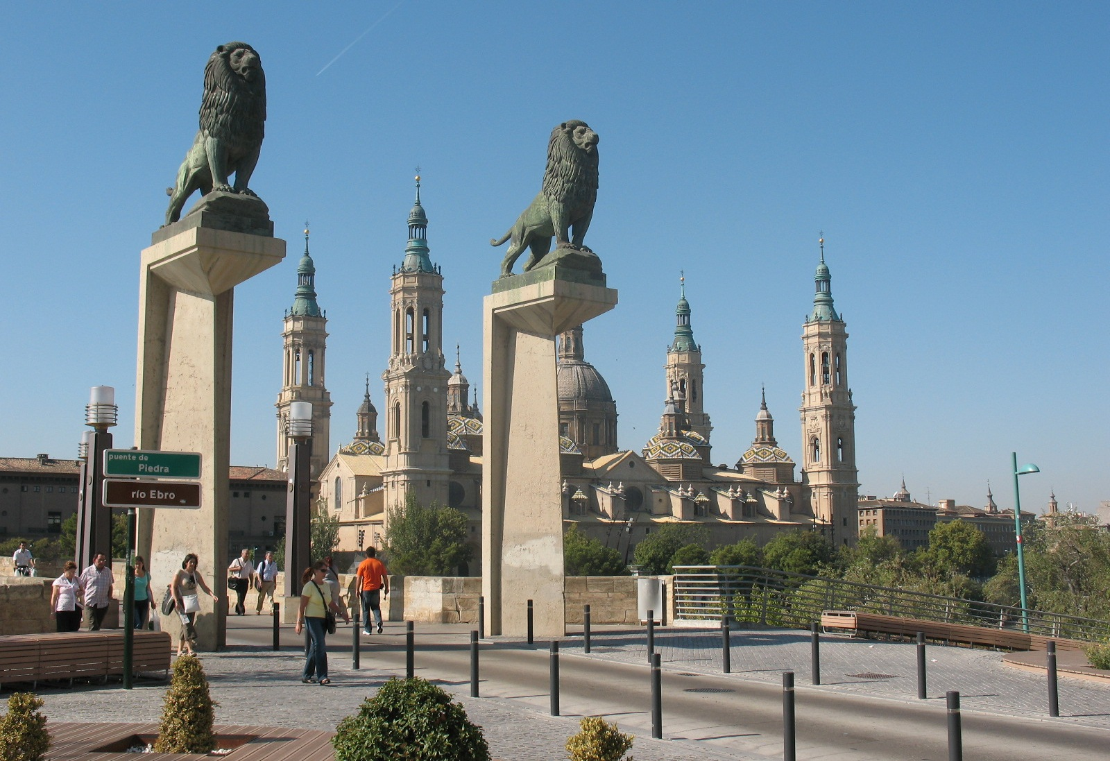 У моста через реку Эбро